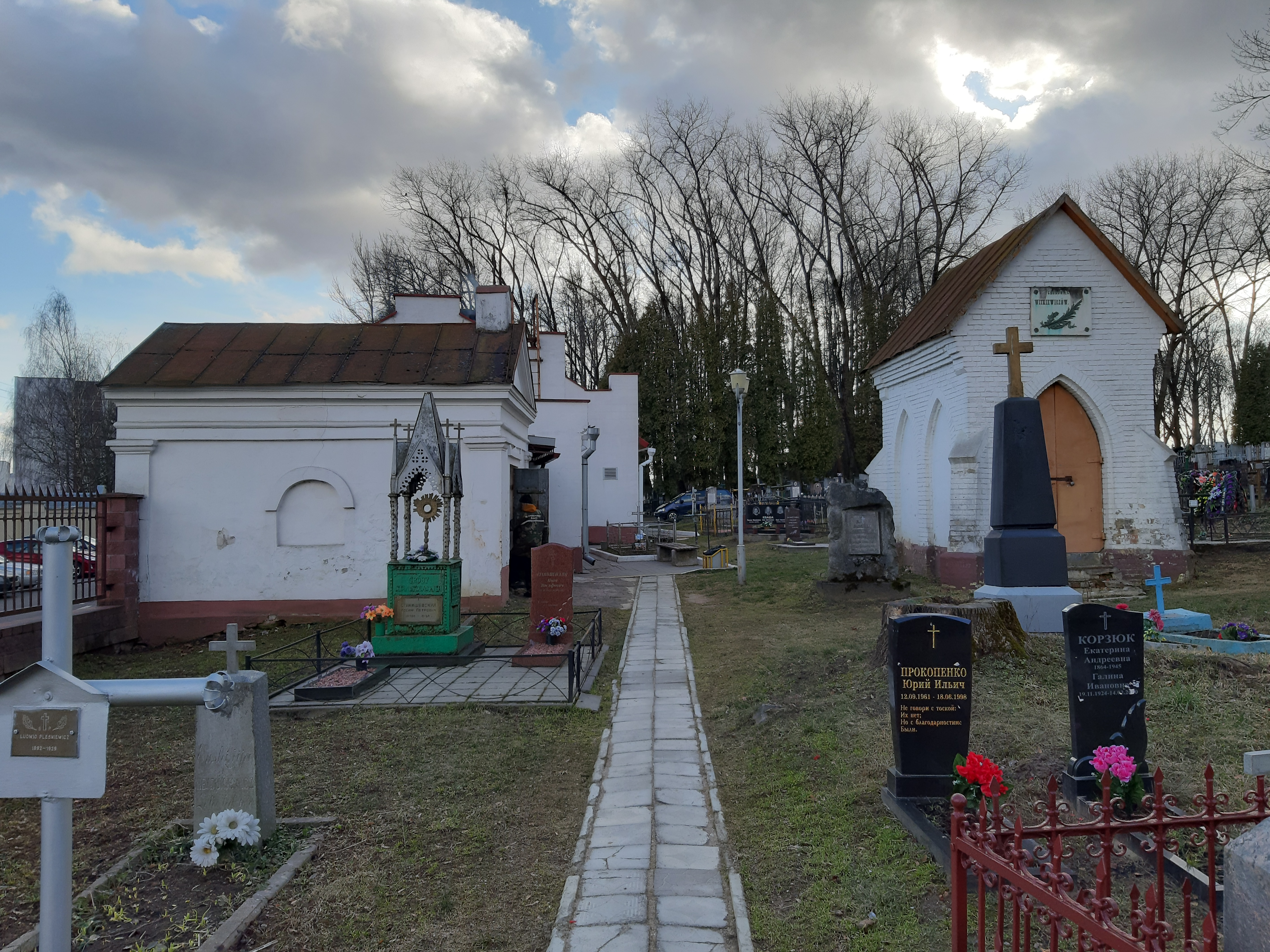 Мінск. Кальварыйскія могілкі. 2020